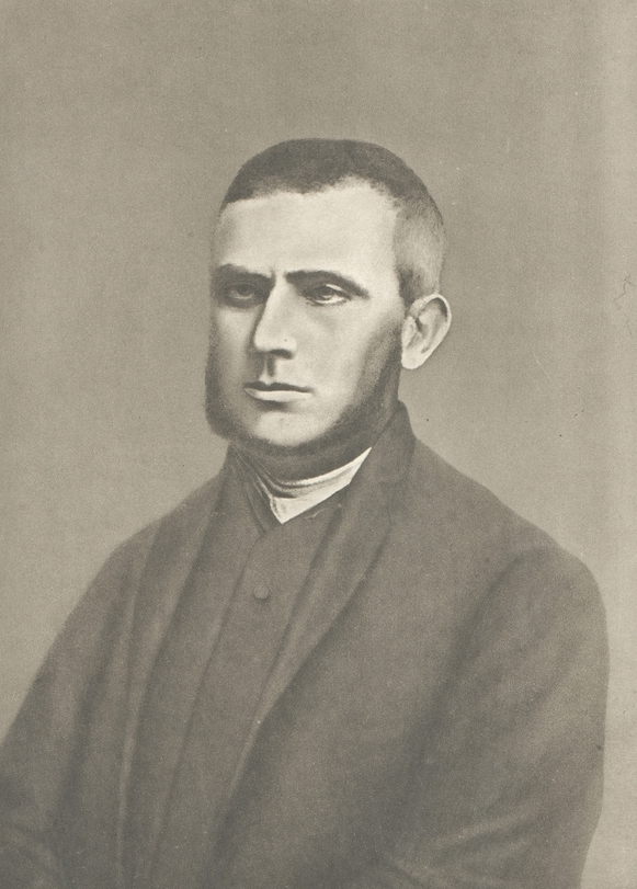 Asbjørn Kloster, kvekerpredikant.